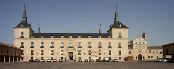 Palacio del duque de Lerma (ayuntamiento)